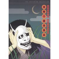 phim kinh dị